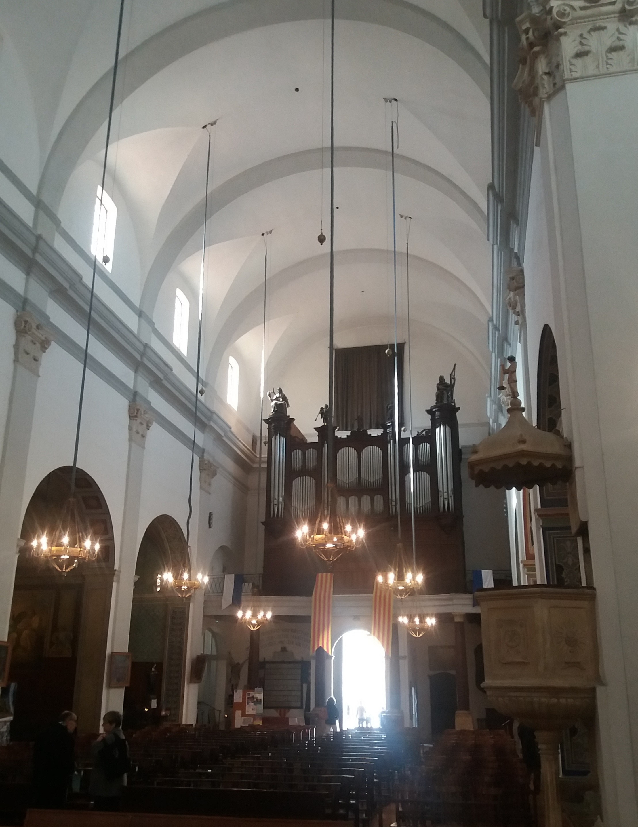 Interior de Sant Pere de Ceret